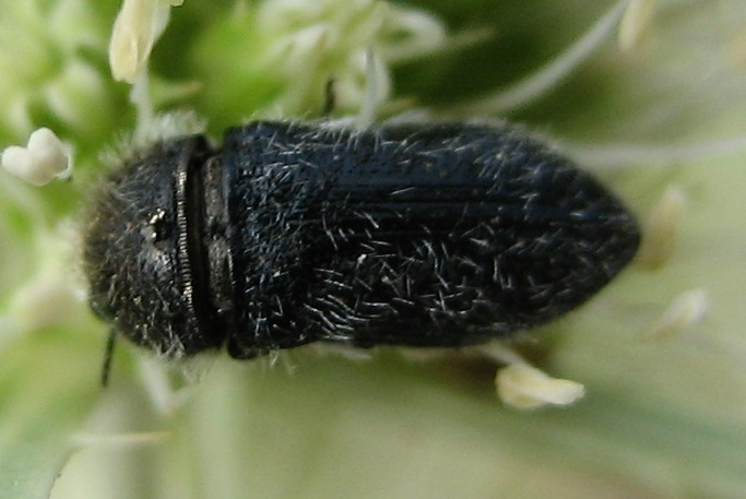 Acmaeodera sobre Eryngium campestre